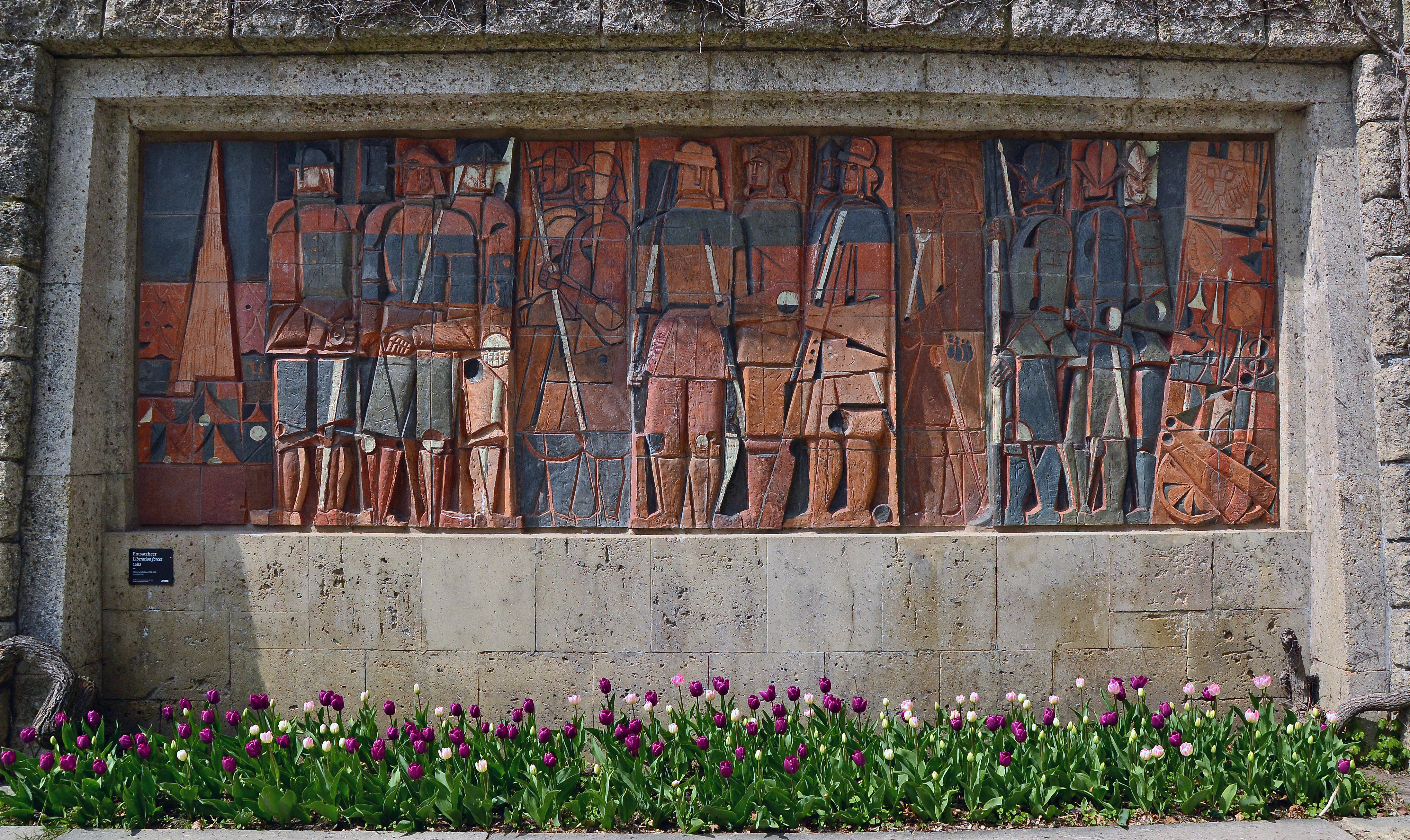 Gedenkstein am Kahlenberg. Das Denkmal an das Entsatzheer von 1683 wurde 1960 von Heinz Leinfellner aus glasiertem Ton gefertigt.